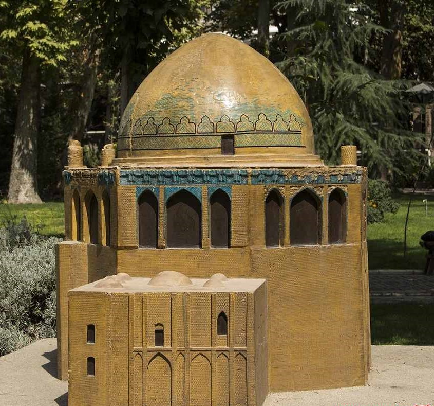 Model of Dome of Soltaniyeh in Iranian art museum garden